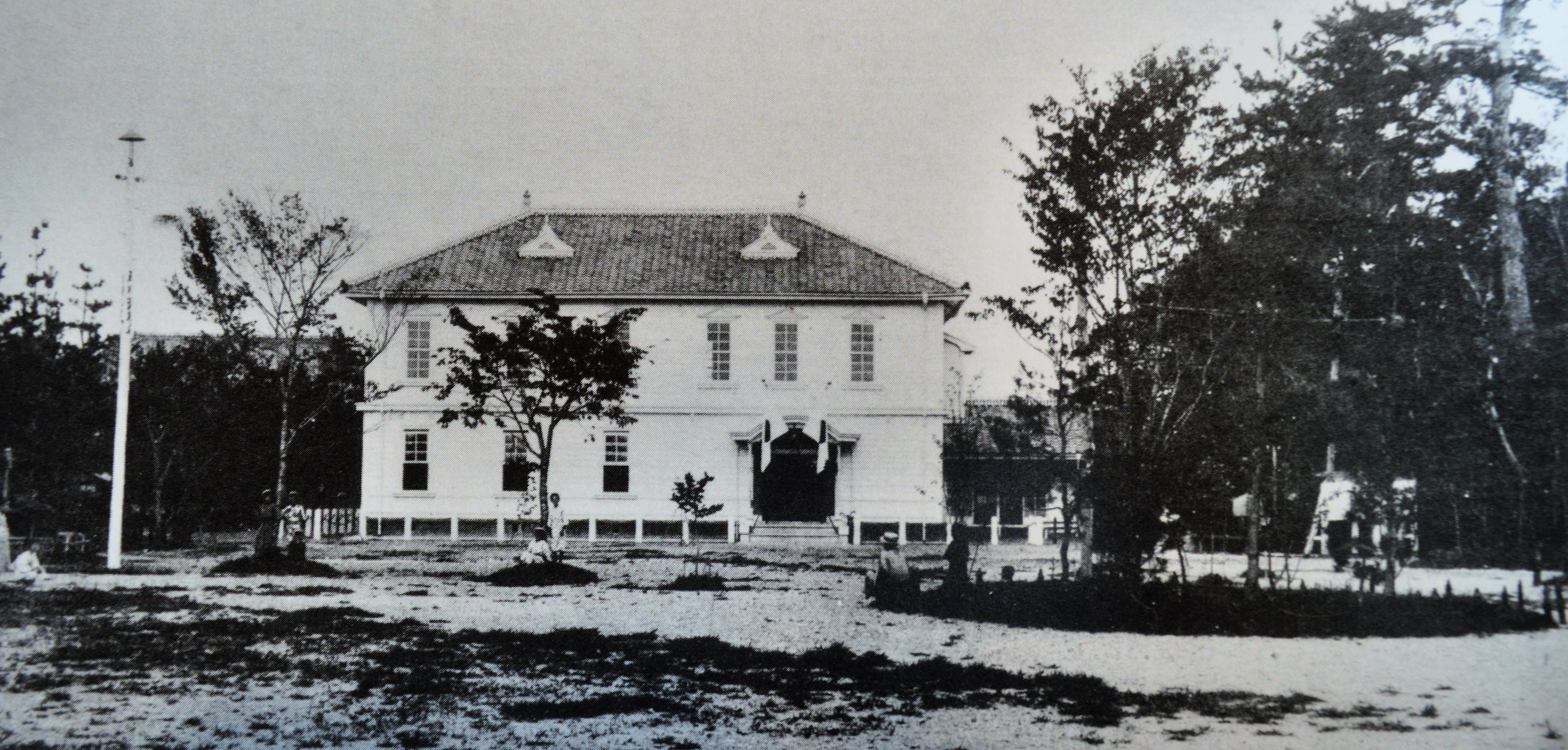 三重県四日市市の諏訪公園にあった四日市市立図書館。1928年以前に撮影。